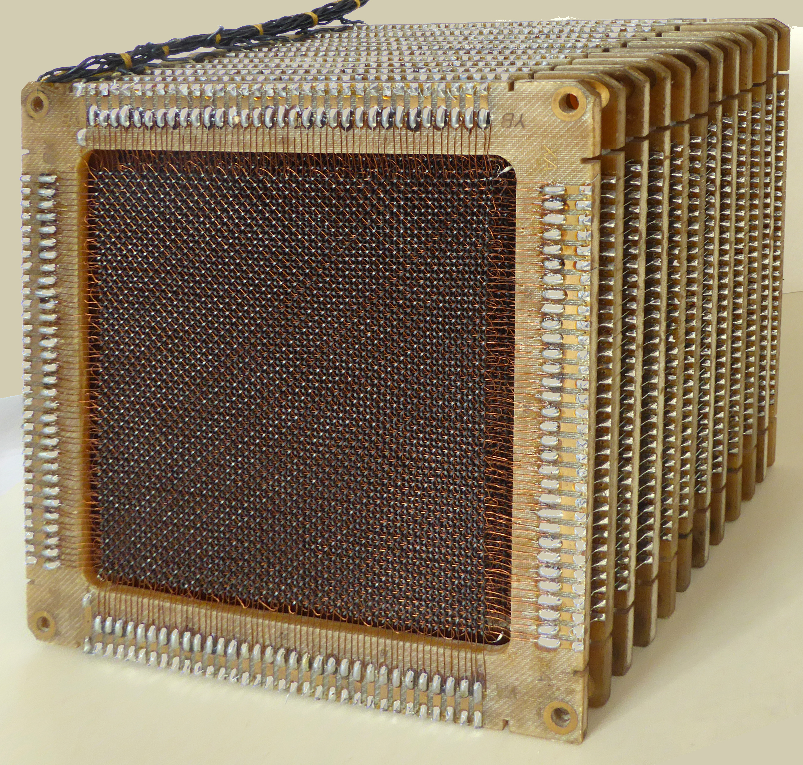 Blok feritové faměti z 1024 kanálového analyzátoru (soukromá sbírka)